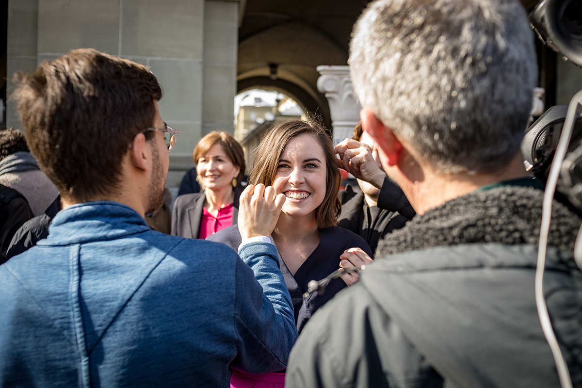 Laura Zimmermann, Co-Präsidentin Operation Libero, gibt ein Interview zur No-Billag-Abstimmung